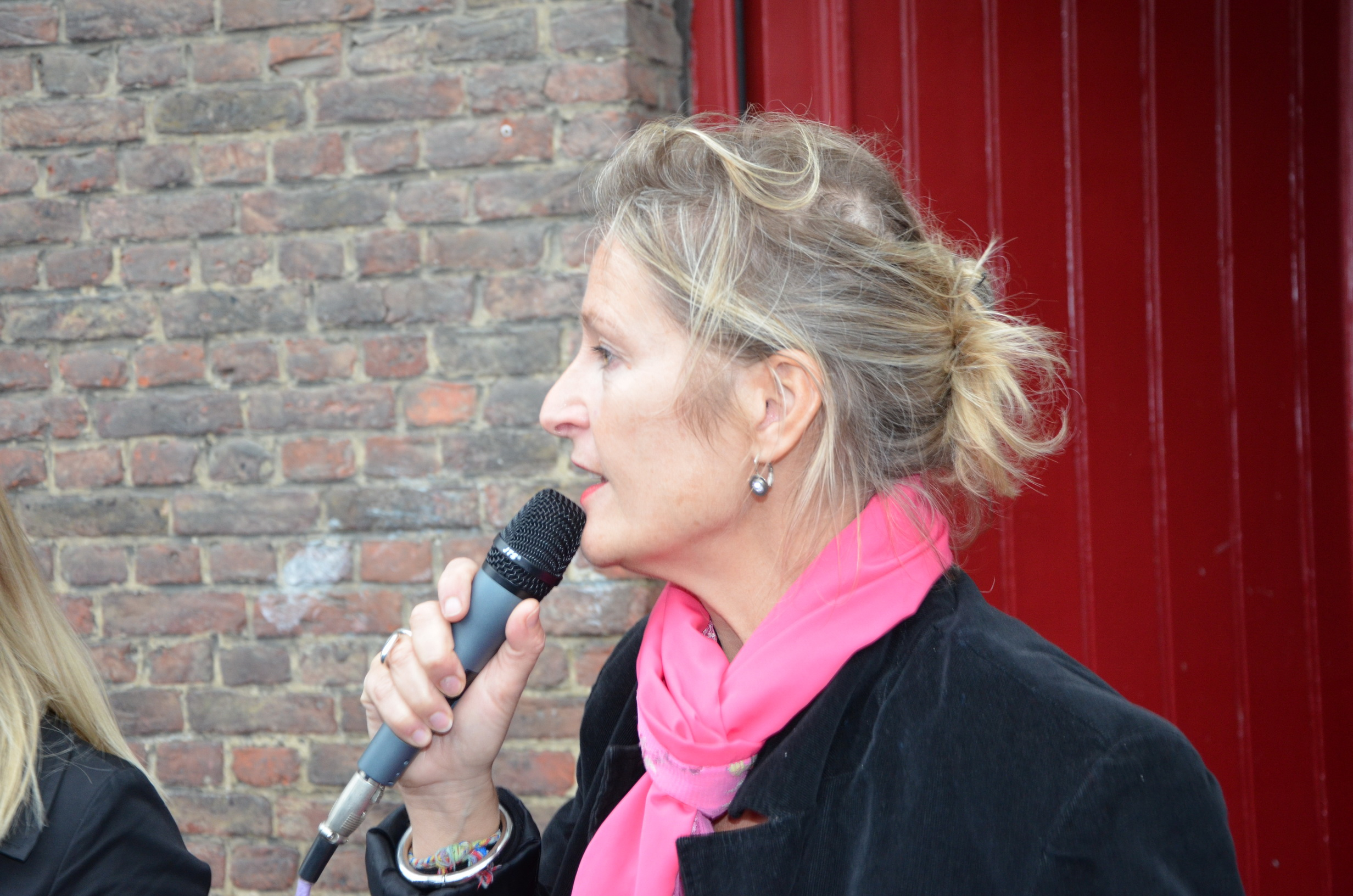 In de vrije basisschool De Kriekelaar te Hofstade (Vlaams-Brabant) kregen alle leerkrachten een warme knuffel van de kinderen. De Vlaamse actrice Veerle Eyckermans gaf op de speelplaats tekst en uitleg.